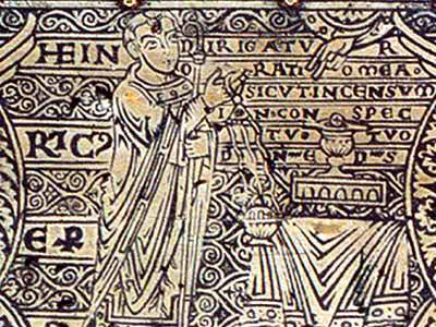 Heinrich von Werl (12.Jahrhundert)